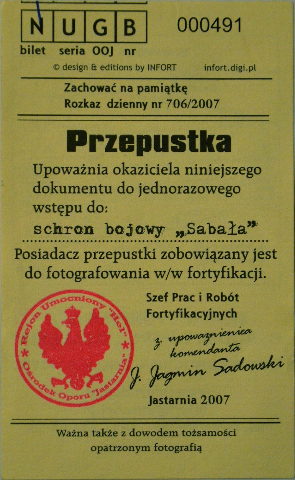 Bilet wstępu do schronu bojowego Sabała, Ośrodek Oporu Jastarnia